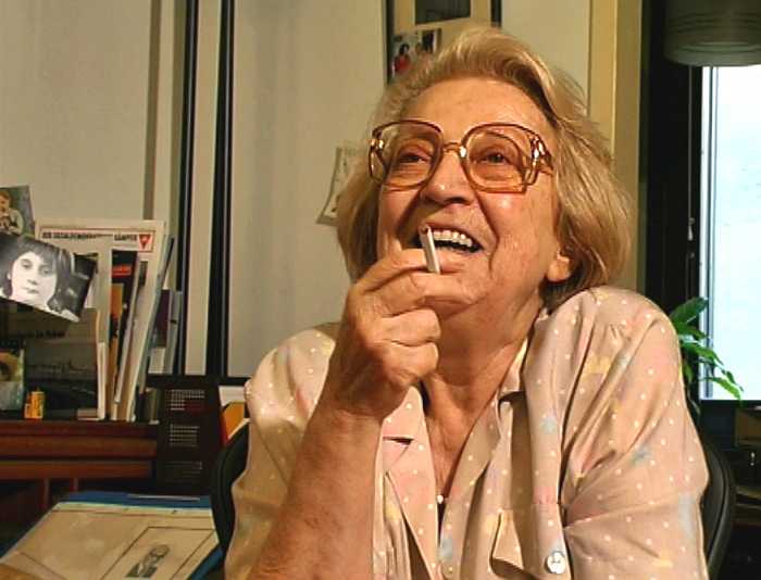 Hilde Zimmermann (* 12. September 1920 in Wien; † 25. März 2002 ebenda), österreichische Widerstandskämpferin gegen den Nationalsozialismus sowie politische Aktivistin.